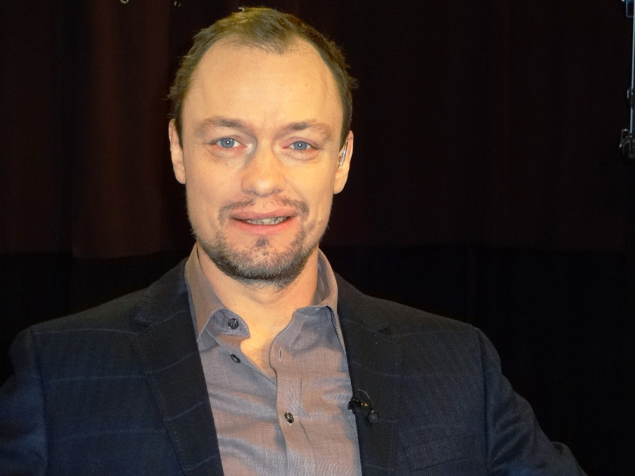 Journalisten Petter Ljunggren under inspelningen av intervjuprogrammet Min sanning